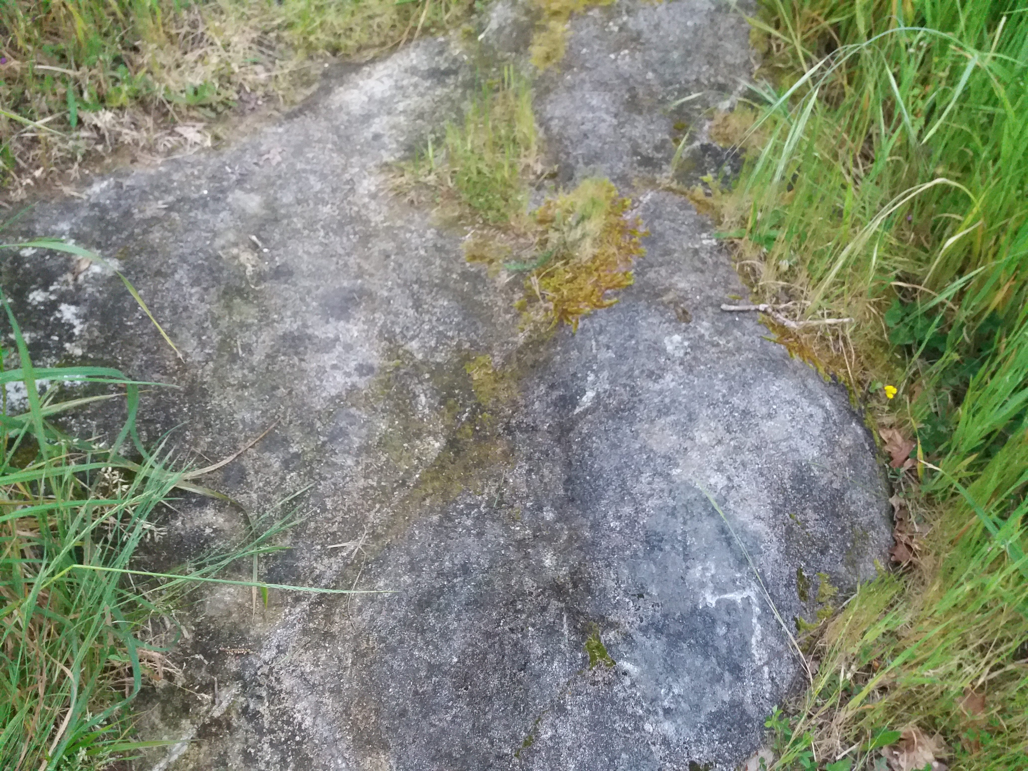 Marca de roda de carro no camiño de Fontán á altura do Pazo de Fontán na parroquia de San Vicente de Mañufe